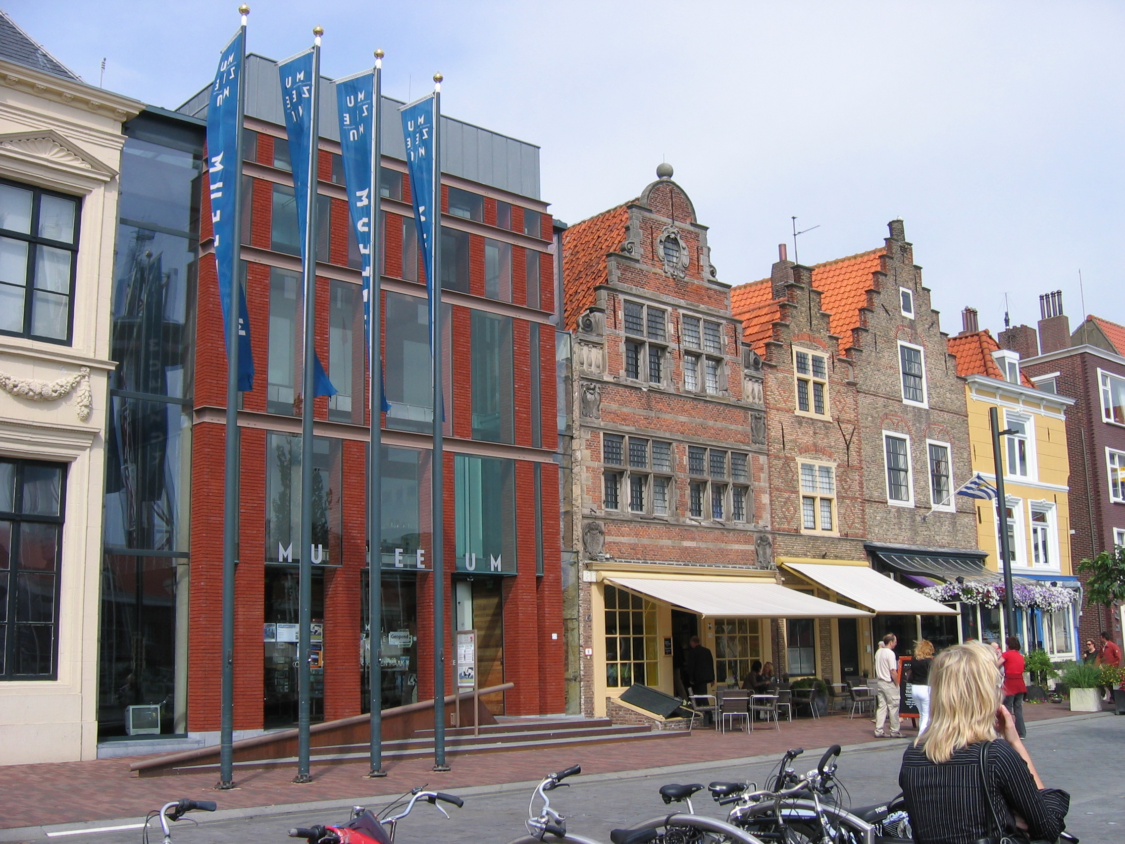 Vlissingen, Zeeuws maritiem muZEEum 1 september 2006 Erfgoedstudies VU Amsterdam Nieuwendijk 11 en woonhuizen 13-15-17-19 4381 BV Vlissingen